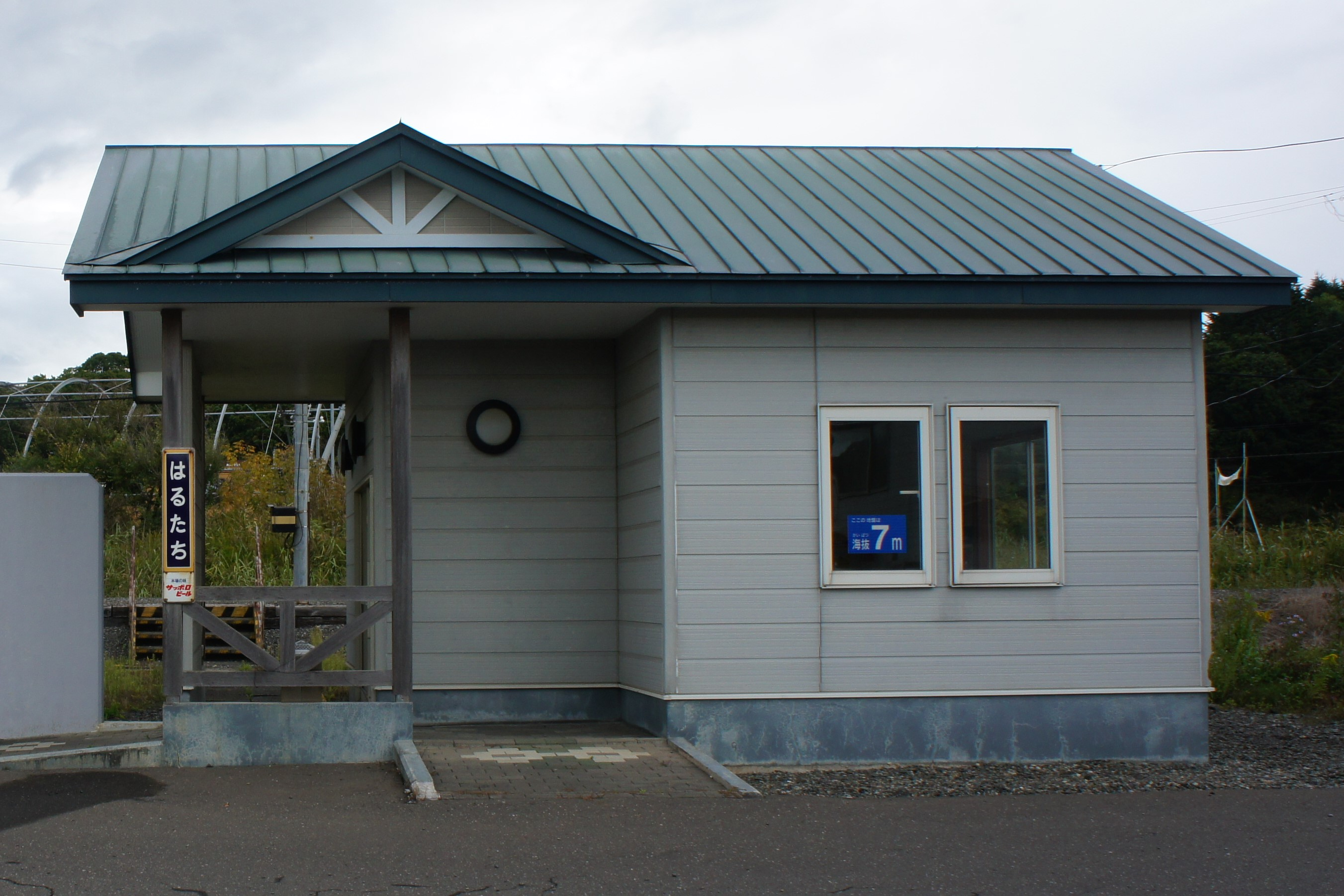 JR日高本線・春立駅の駅舎